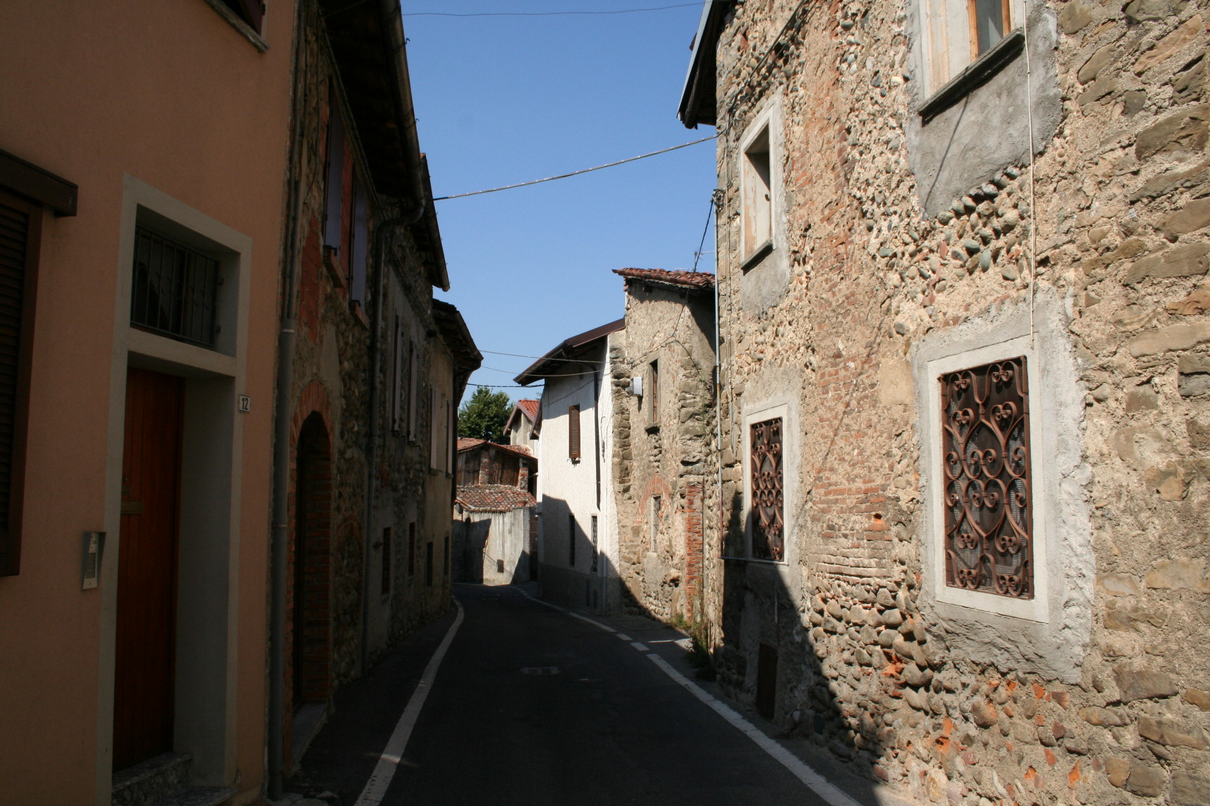 Solza, Bergamo, panorama.